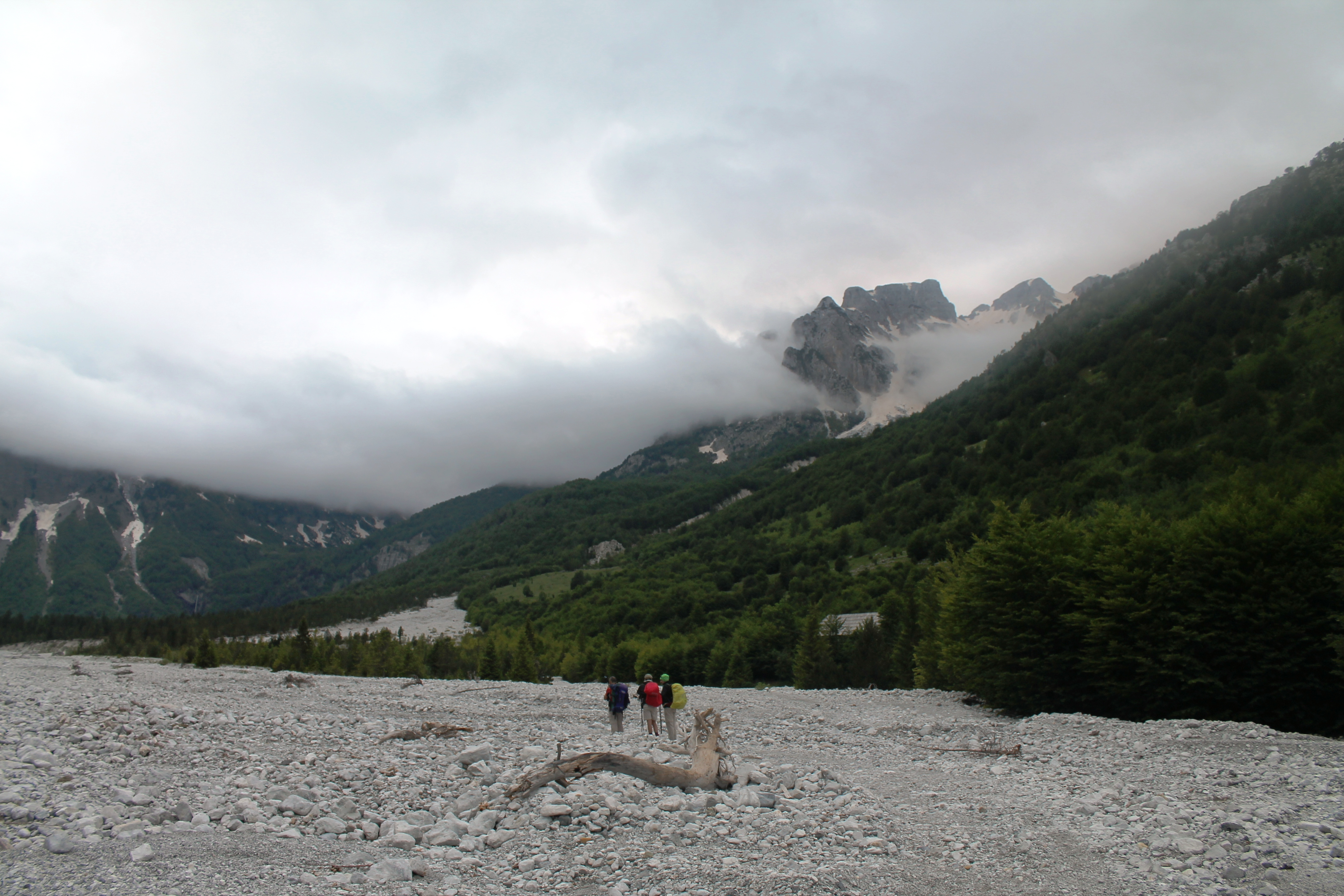 Shtrati ranor i lumit Valbona